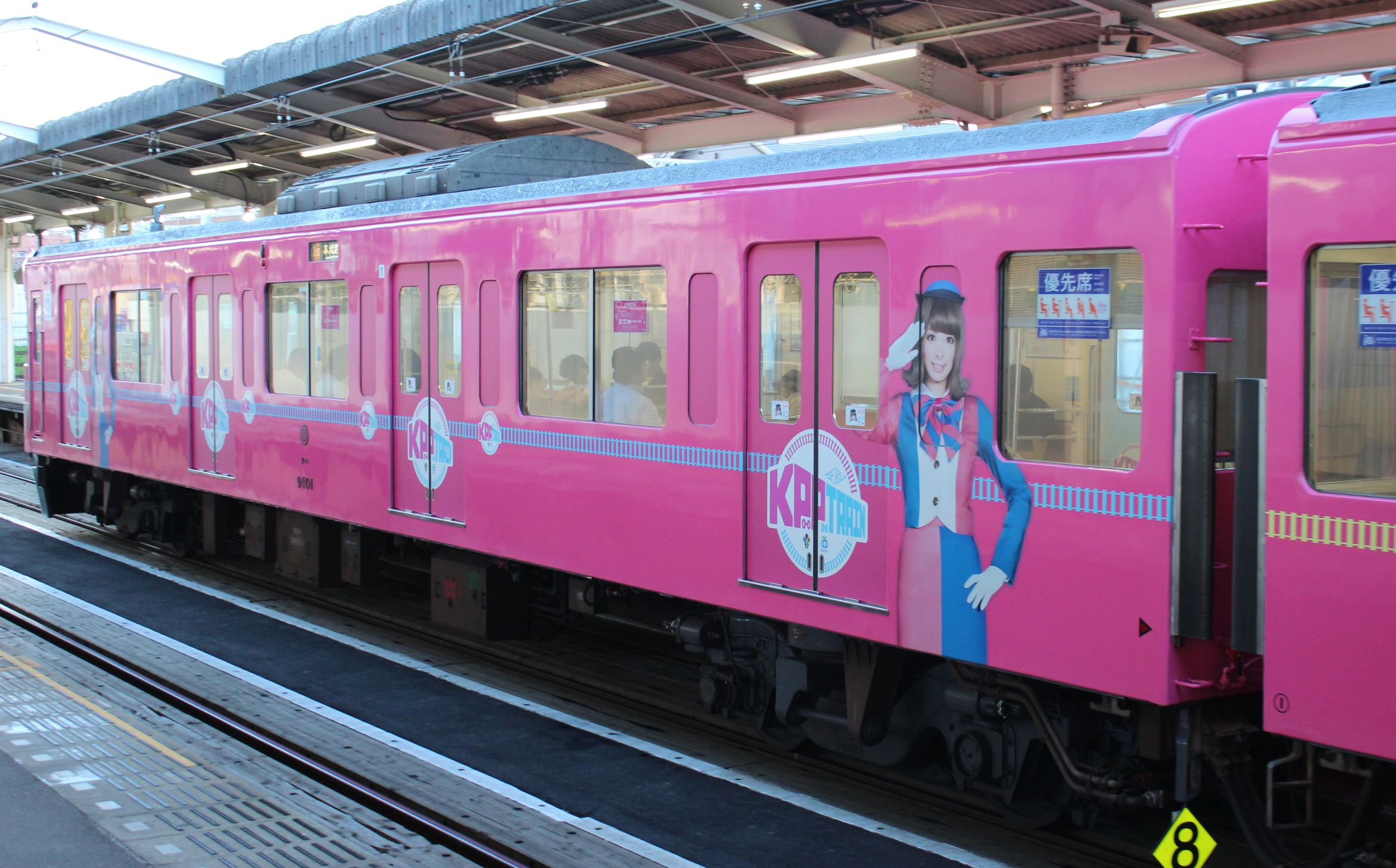 西武9000系電車9101「SEIBU KPP TRAIN」